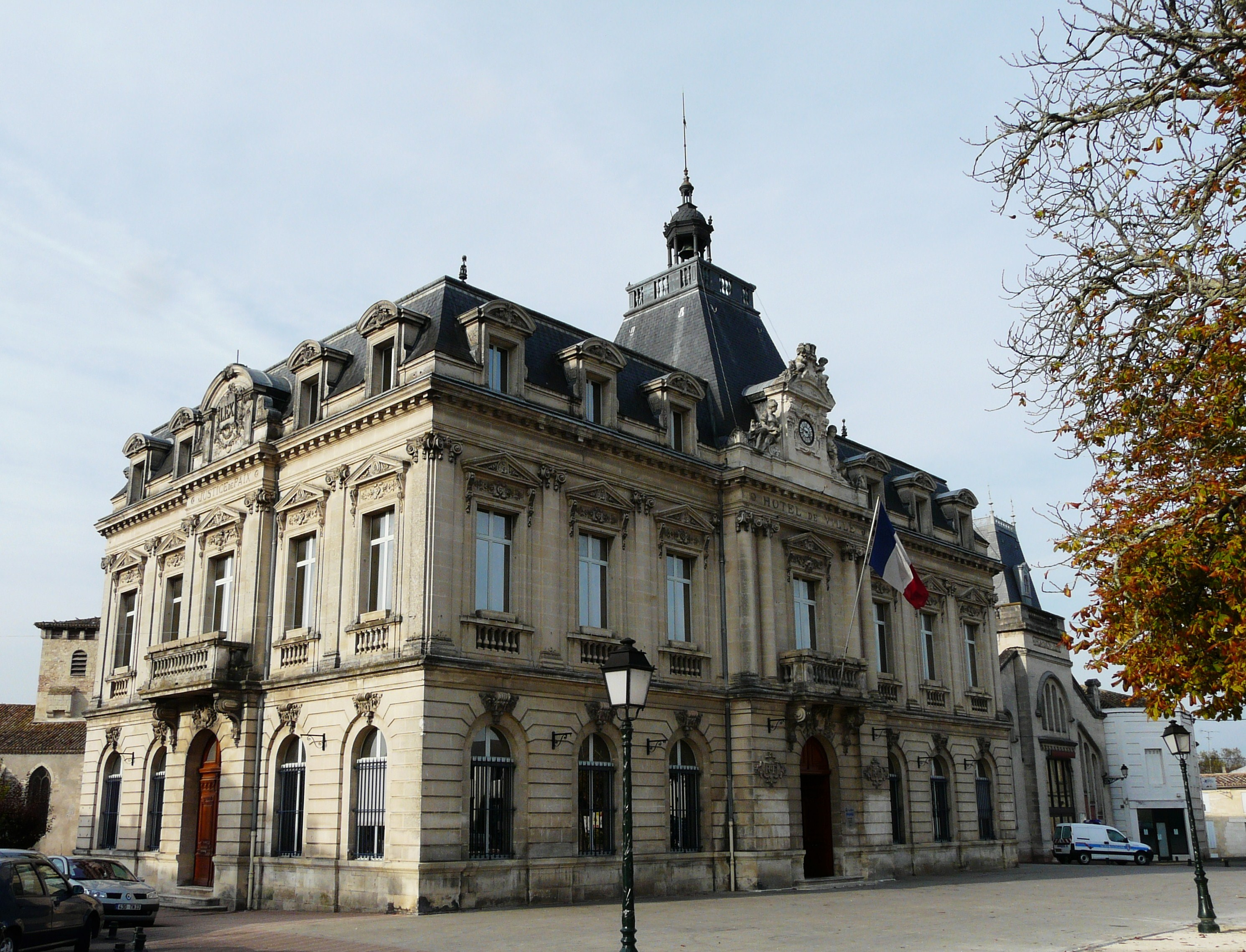 L'hôtel de ville de Coutras, Gironde, France